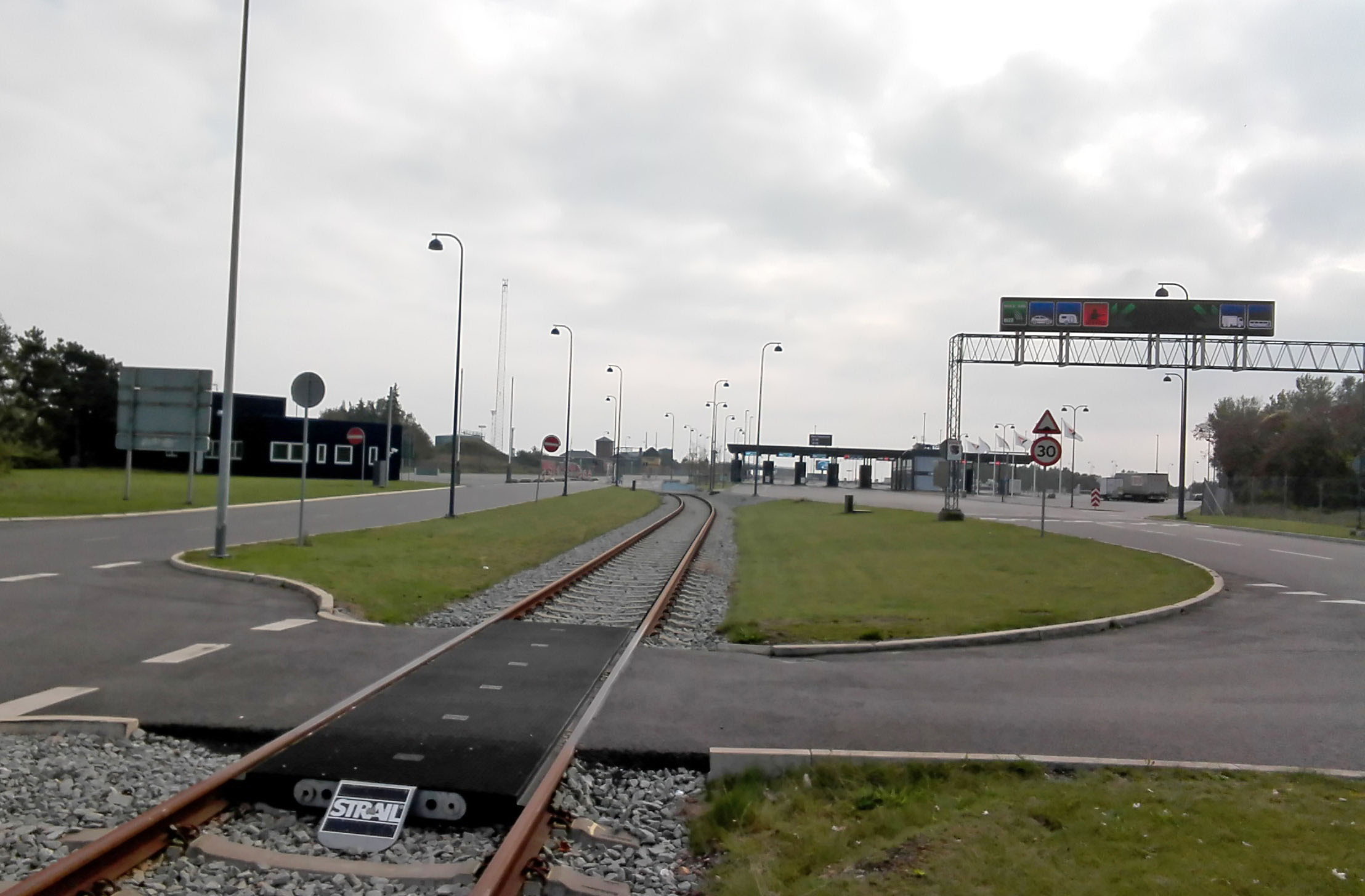 Gedserbanen passerer havneterrænet i Gedser